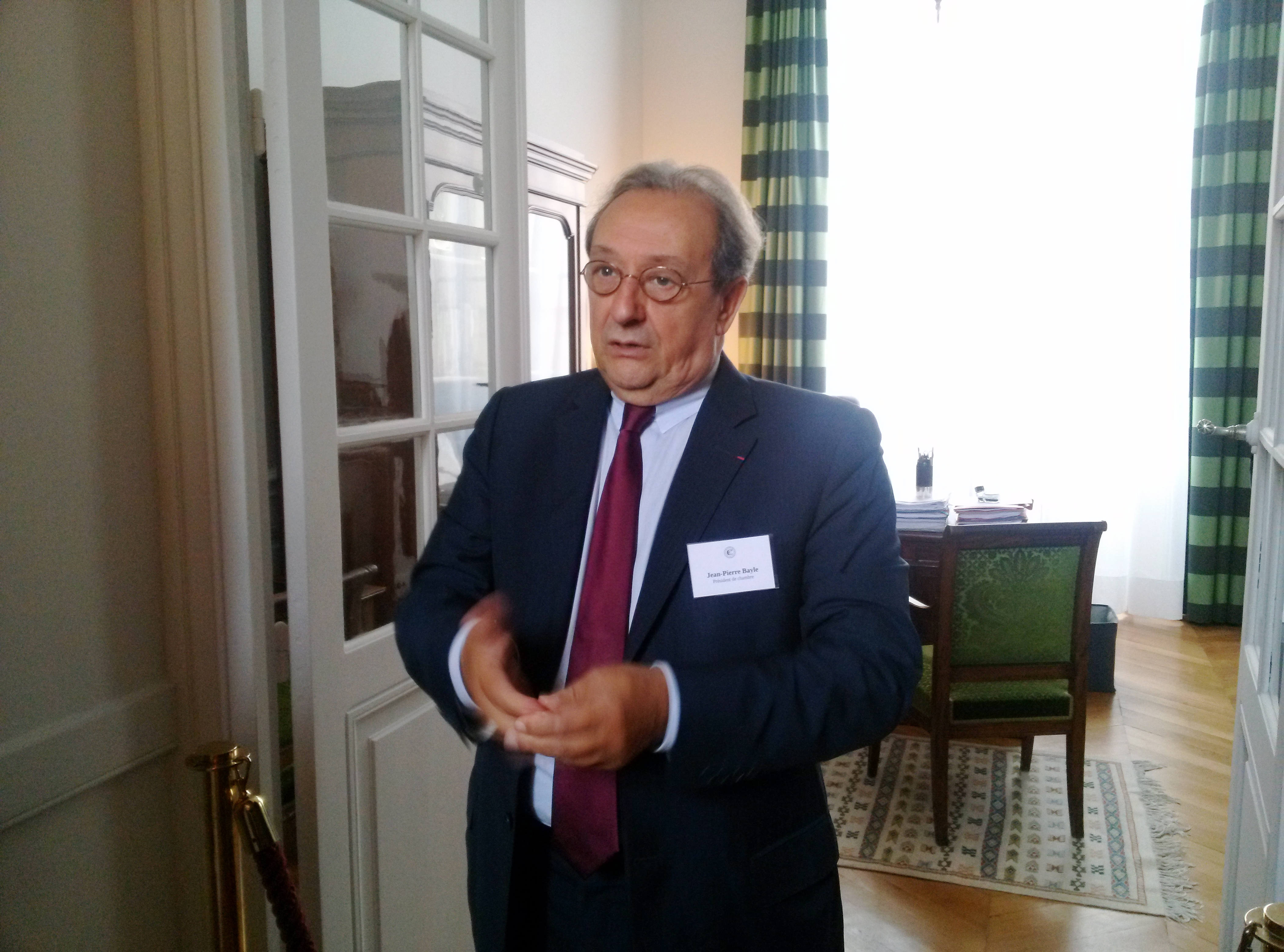 Jean-Pierre Bayle